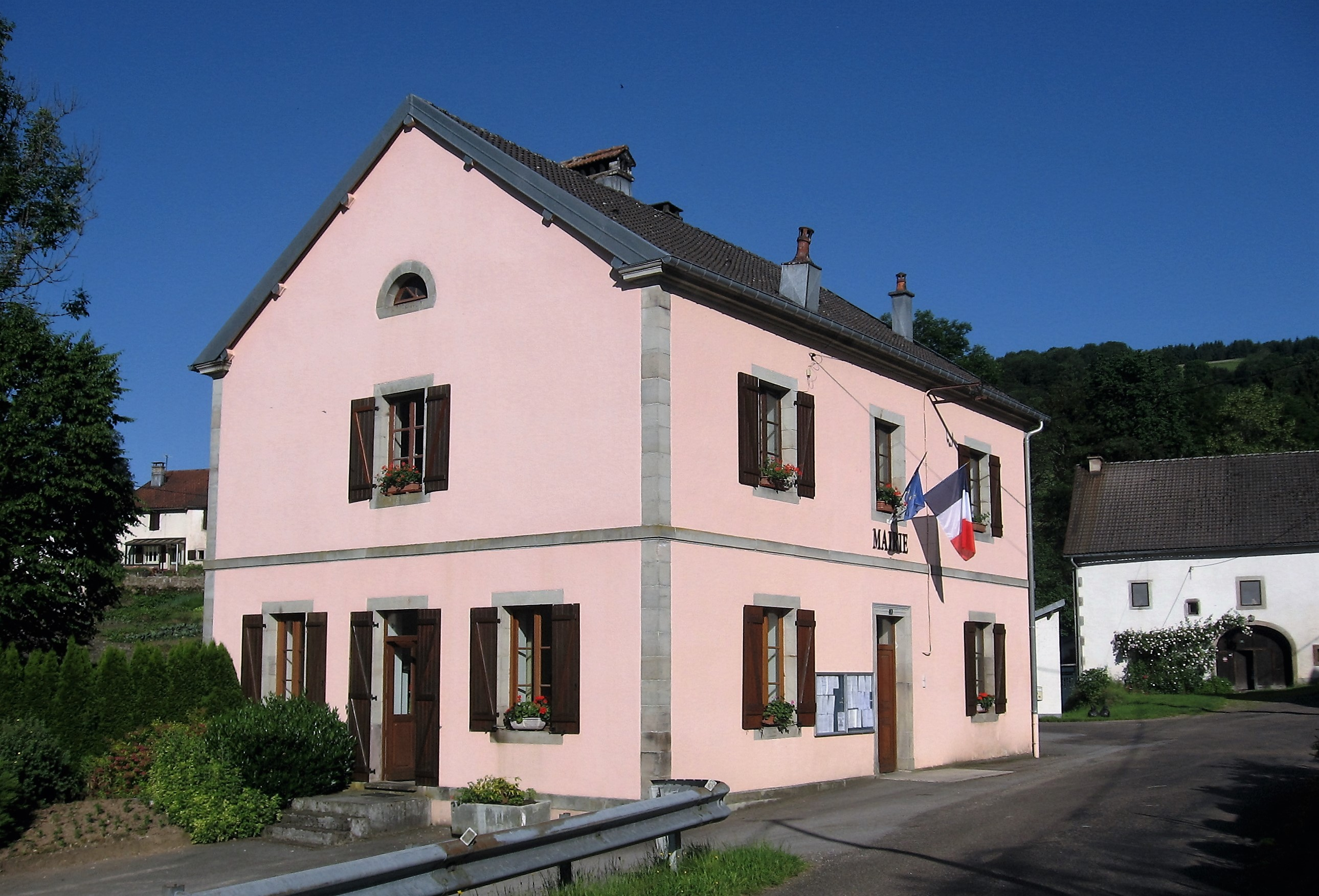 située au 3 rue de la mairie